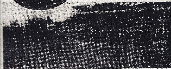 昭和６年５月１９日の河北新報に掲載された２０１２年５月現在著作権保護期間を過ぎた写真をトリミングし、コントラスト調整をしました。昭和６年５月１６日の石巻競馬場での競馬の光景です。